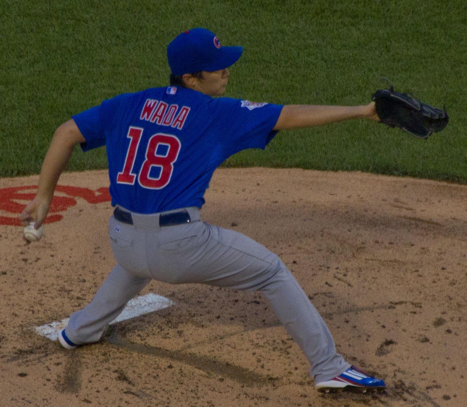 Tsuyoshi Wada